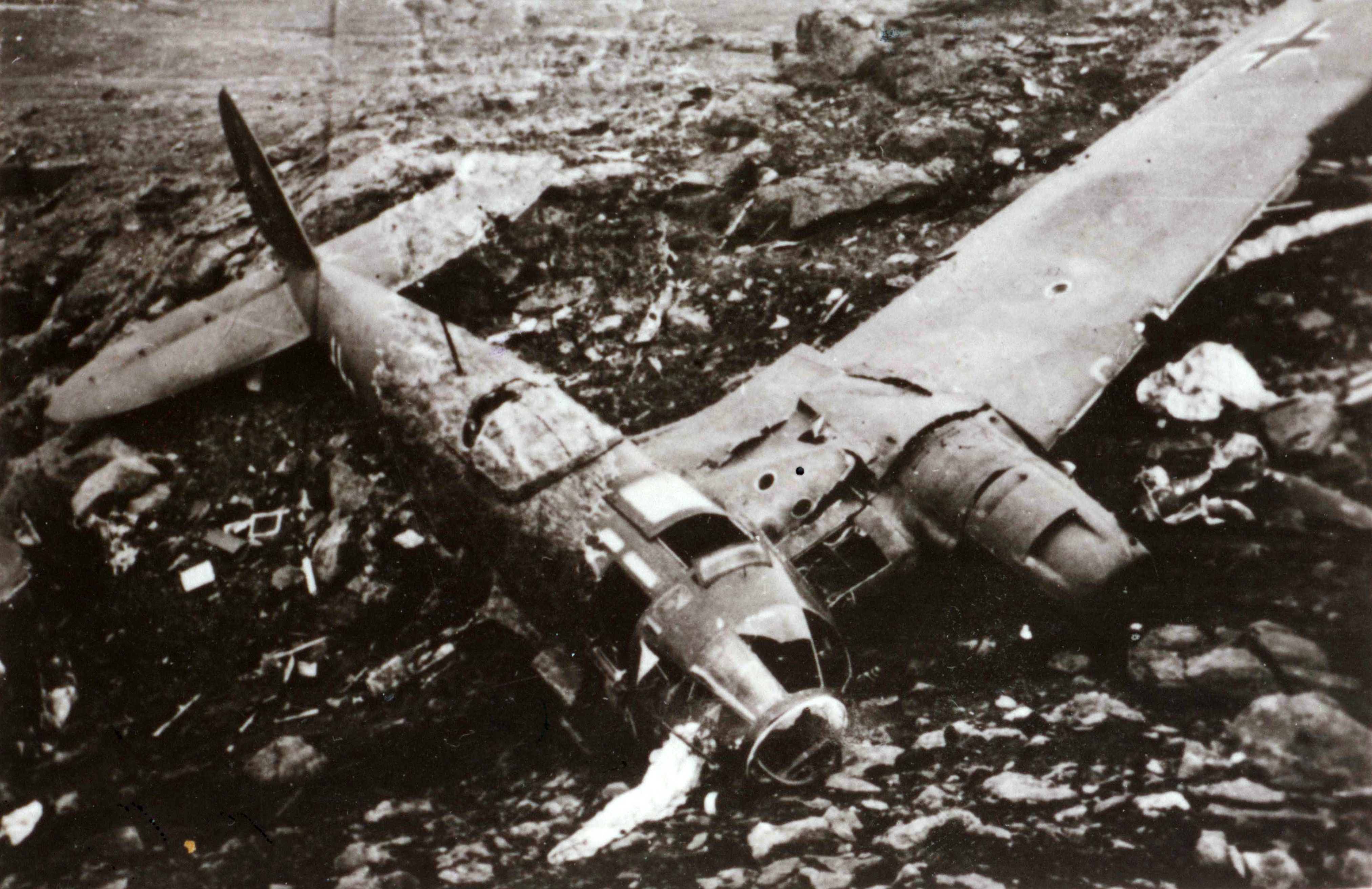 Ødelagt tysk bombefly - Heinekel HE 111 Tittel / Title: Narvik Dato / Date: 1940 Fotograf / Photographer: Franz Hollerweger Sted / Place: Narvik, Nordland, Norge Eier / Owner Institution: Arkiv i Nordland Lenke / Link: Arkiv i Nordland Arkivreferanse /Archive reference: AIN.NA143.0038 Fra Dag Skogheims Privatarkiv Tekst bak på bildet: Kampfraum Narvik 1940, (…) Deutscher horizontalbomber, sicherlich nach feindtreffer! Es ist eine HE 111 "-maschine"! Les mer om Heinekel HE 111 på Wikipedia.